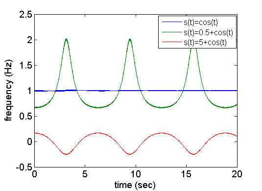 中文（台灣）: 瞬時頻率